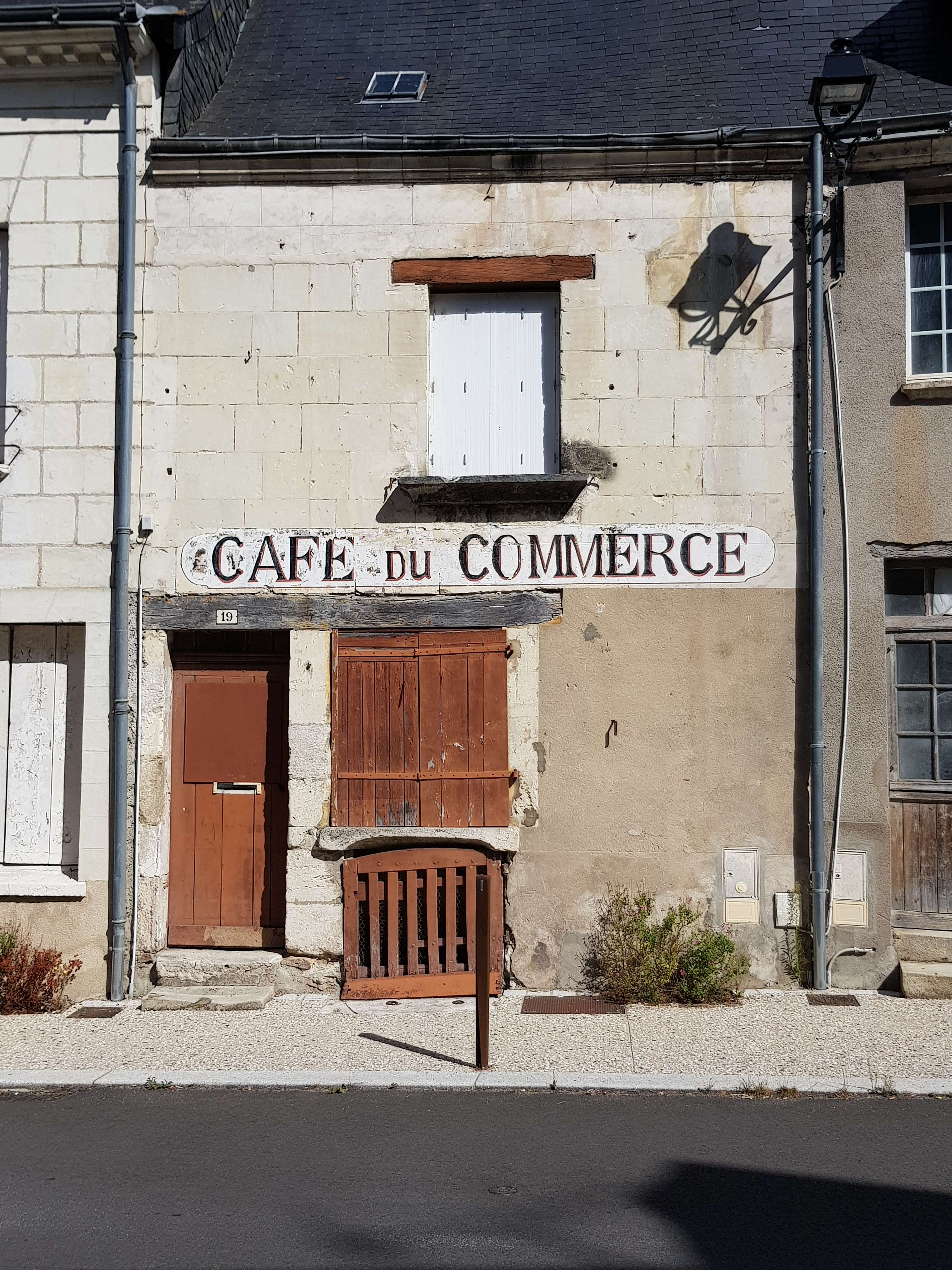 Café du commerce - Cormery